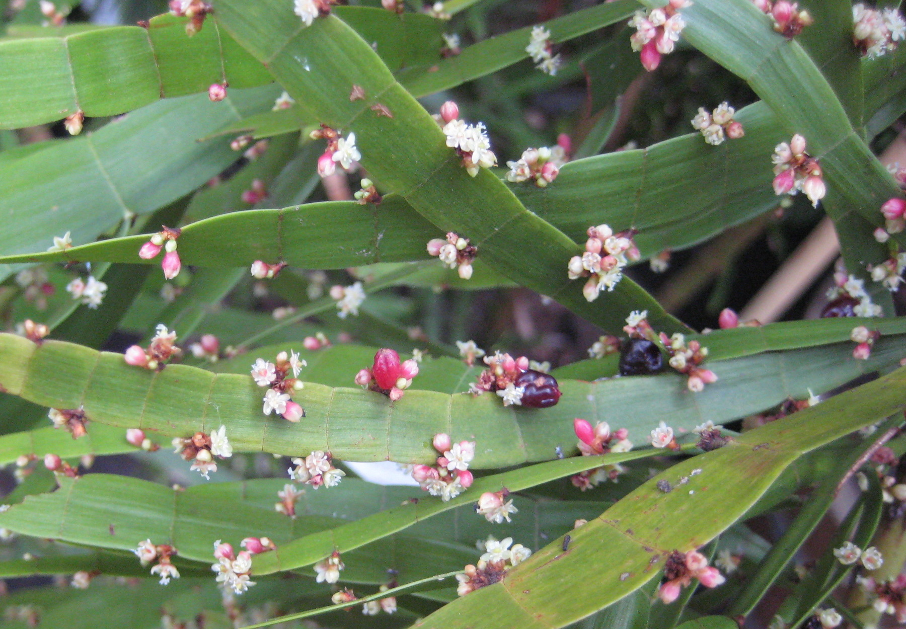 Homalocladium platycladum im Botanischen Garten Dresden